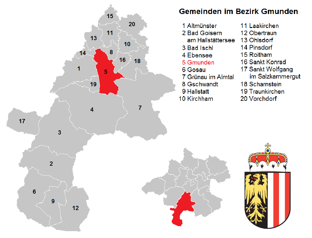 Gemeinden im Bezirk Gmunden